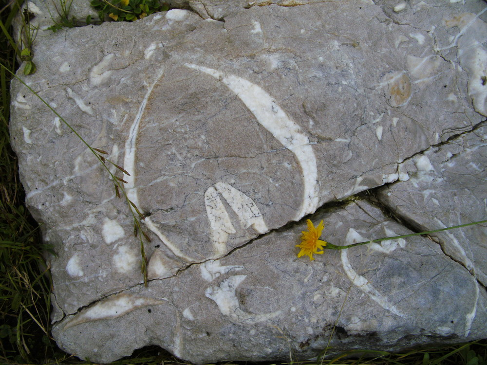 Kuhtrittmuschel - Megalodonten auf einem ehemaligen Fundamentstein einer nicht mehr existierenden Almhütte an der Lainl-Alm, 3000 m nördlich Jachenau, Kreis Bad Tölz-Wolfratshausen, Bayerische Voralpen.